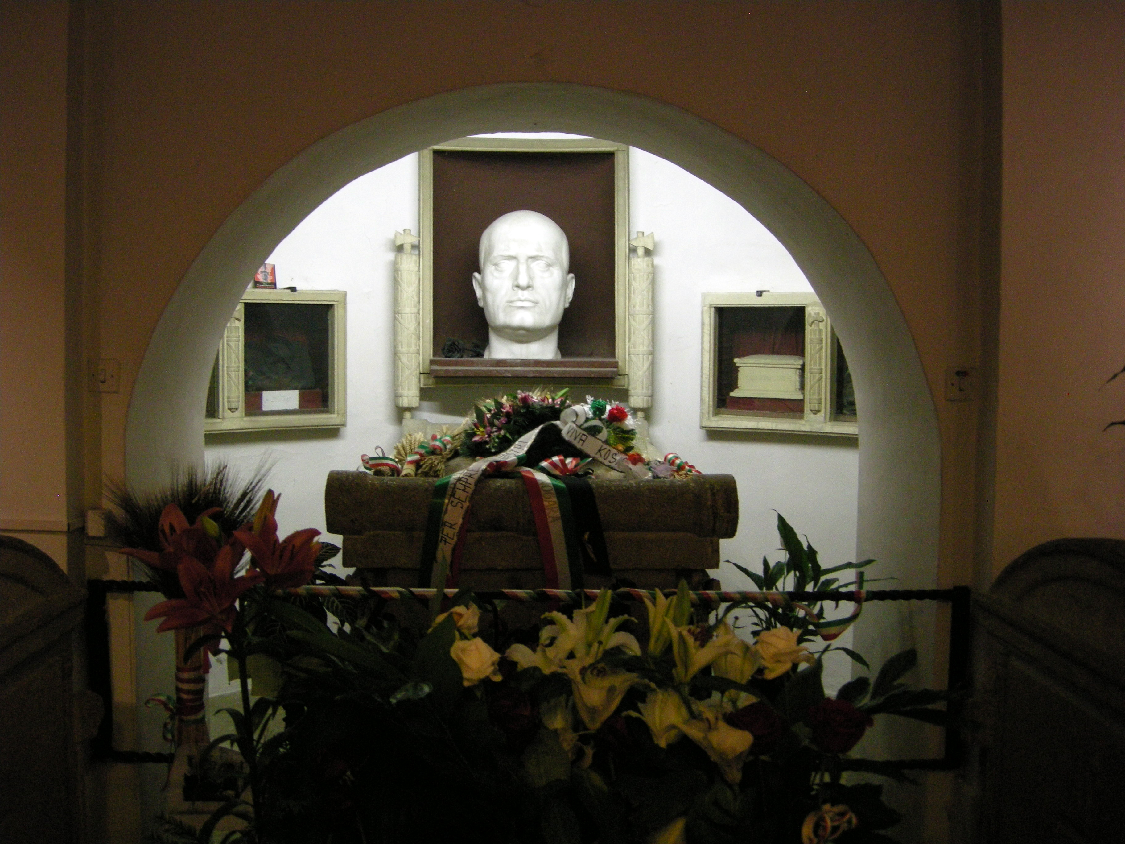 Cripta del cimitero di San Cassiano a Predappio, tombe della famiglia Mussolini